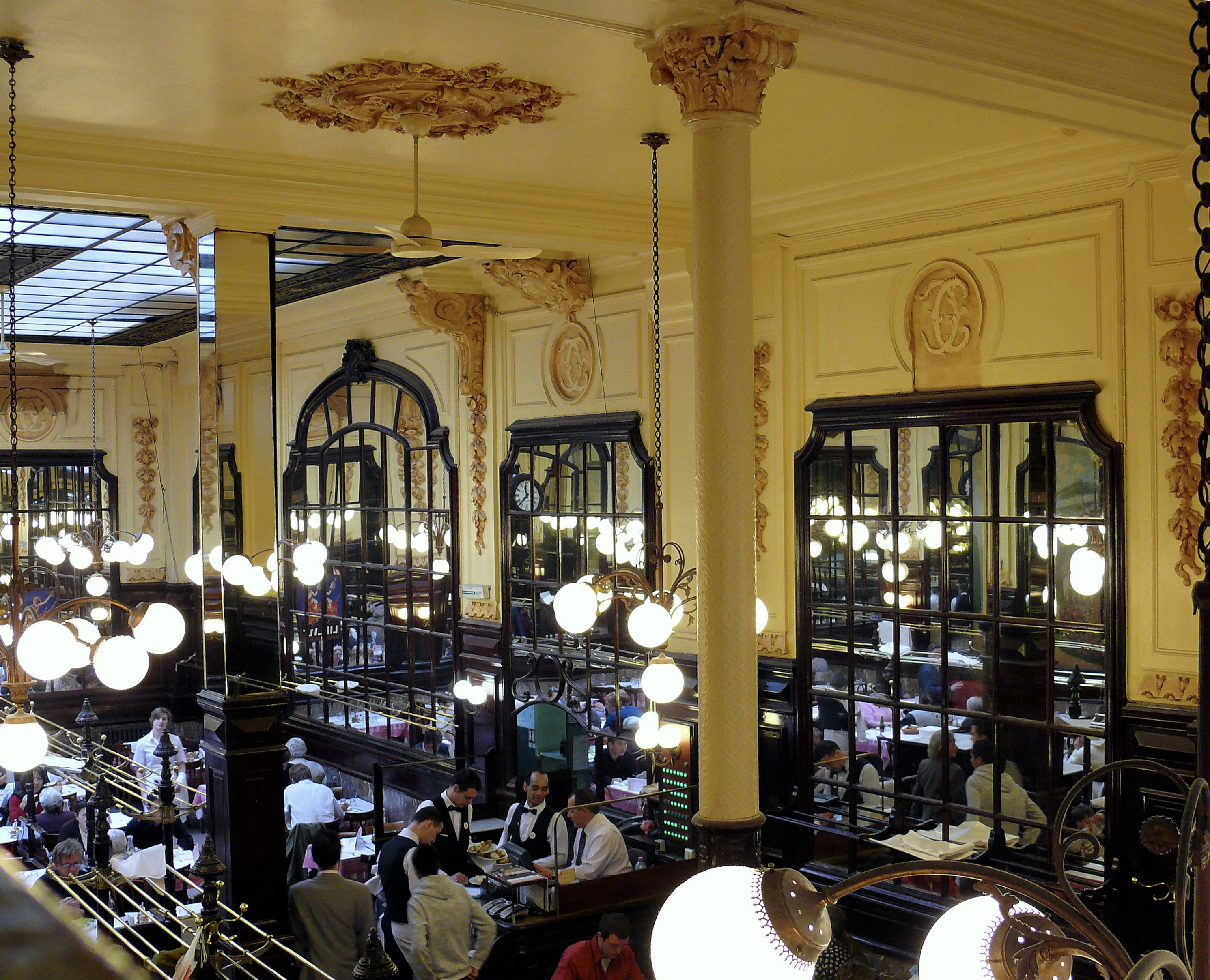 Paris 9ème arrondissement - Chez Chartier